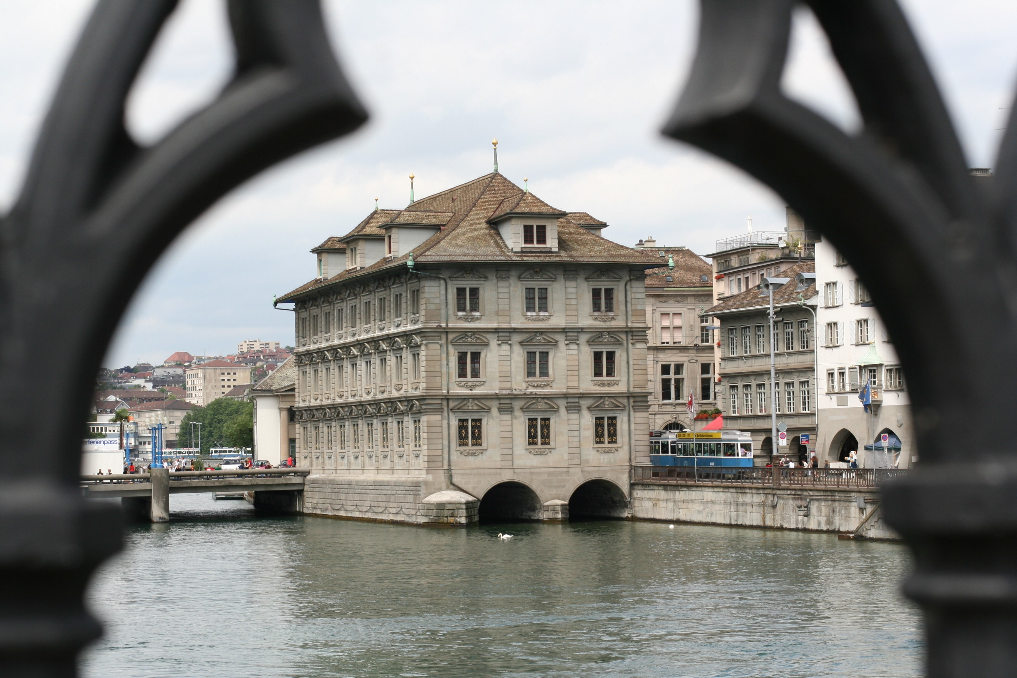 Das Rathaus von Zürich. Es besitzt nur einen Ein- und Ausgang zum Limmatquai hin. Die Fenstergitter im Parterre lassen sich von innen öffnen, damit die Ratsmitglieder im Notfall zur Limmat hin evakuiert werden können.Blick durch das Geländer der Münsterbrücke über die Limmat.